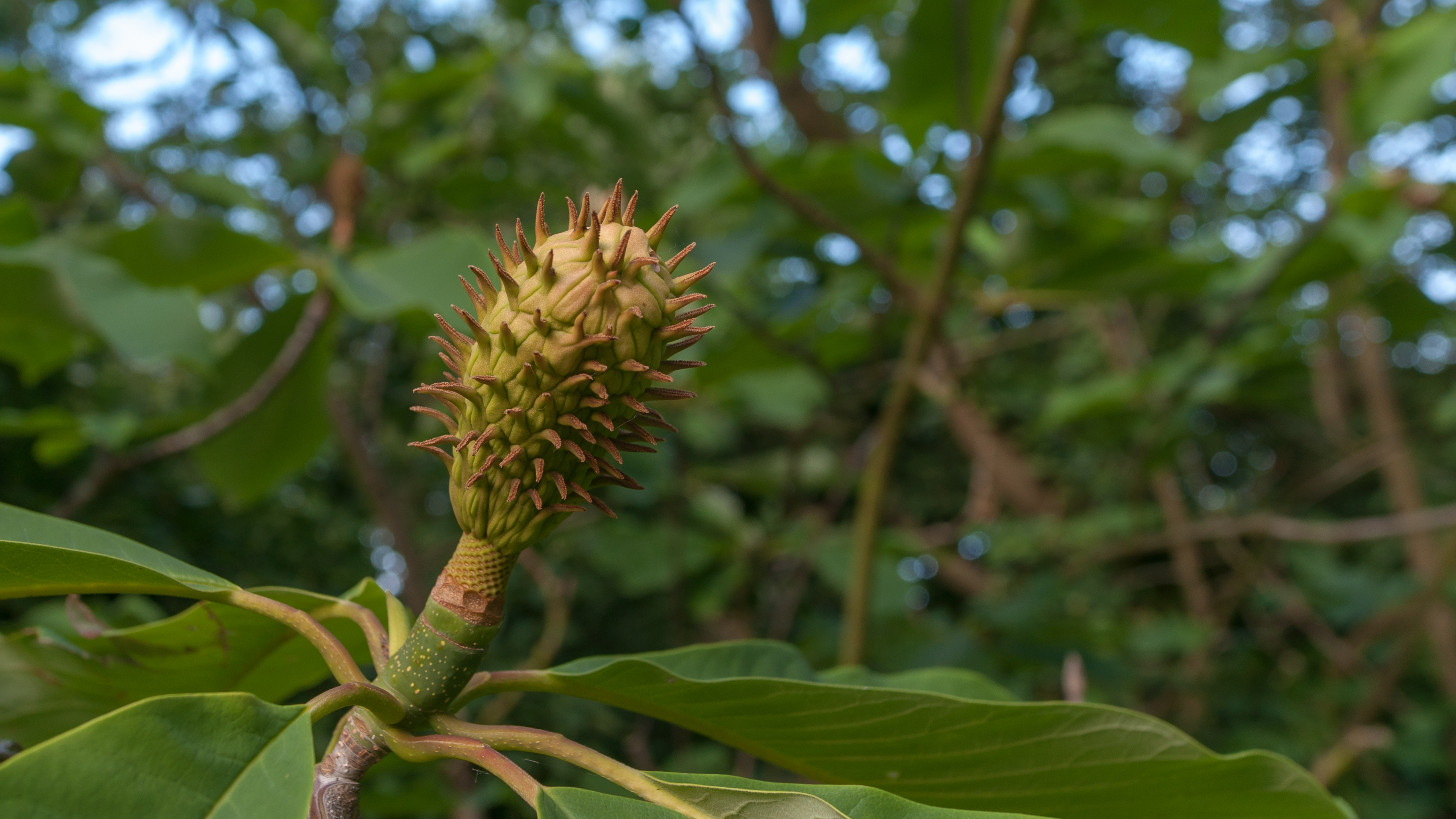 Magnolia obovata, Frucht im Abendlicht.